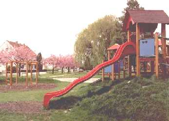 Der große Kinderspielplatz in Riedlingsdorf im Frühling